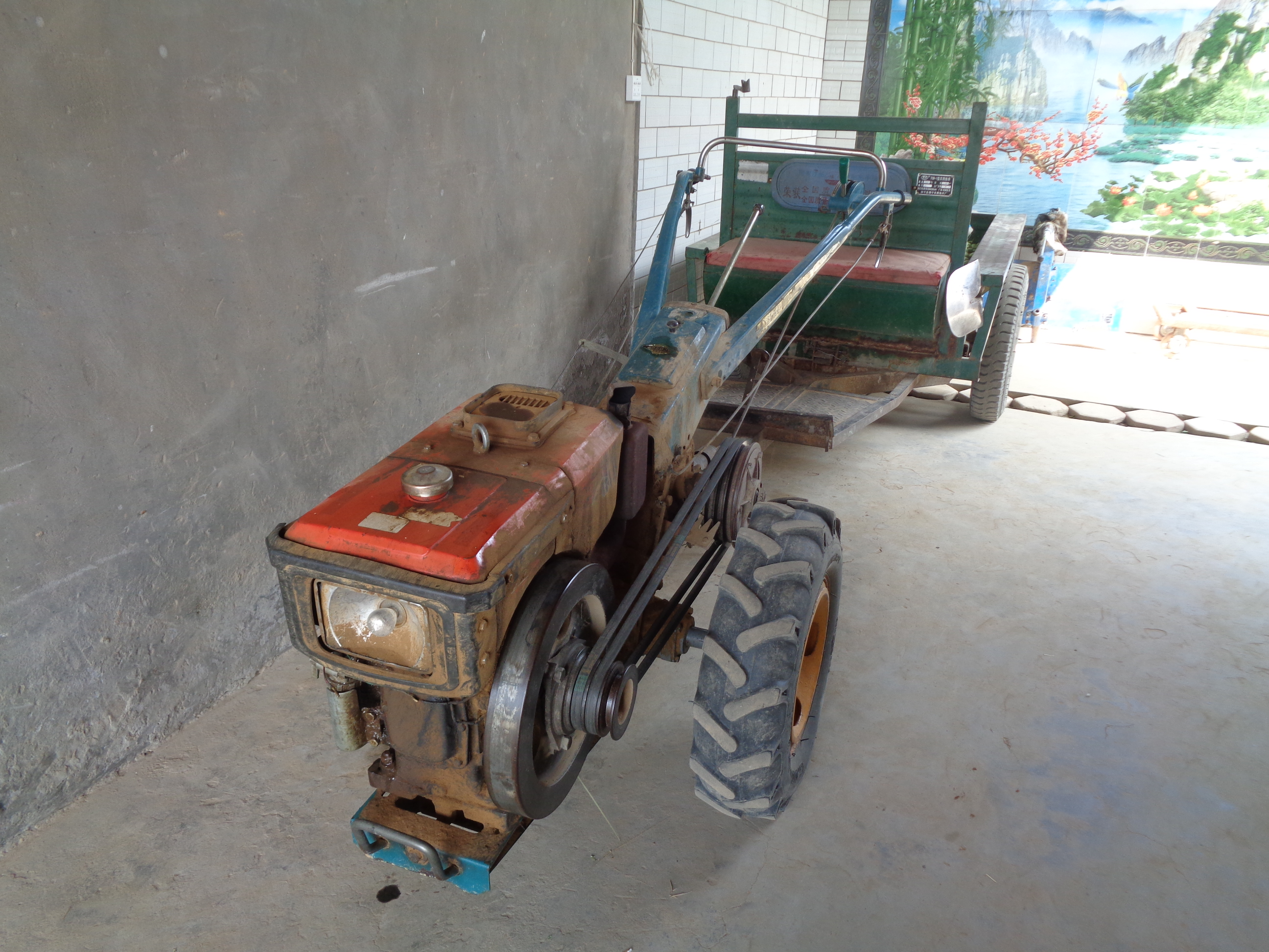 渭南市合阳县雁村的农用拖拉机